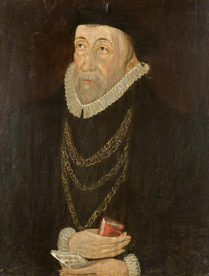 Richard Pate (1516–1588)